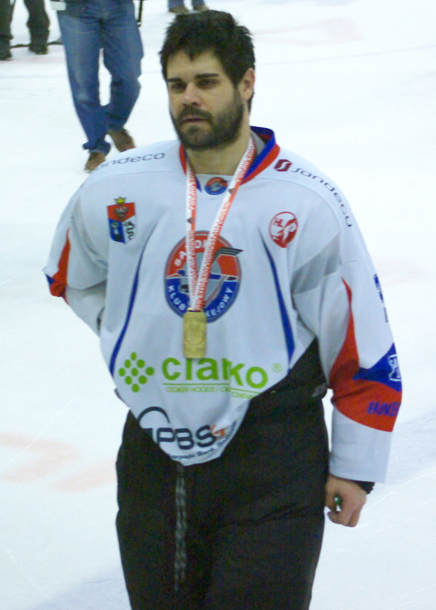 Szósty mecz finałowy o mistrzostwo Polski w hokeju na lodzie w sezonie PHL 2013/2014: Ciarko PBS Bank KH Sanok – GKS Tychy (2:0), 3 kwietnia 2014 w Sanoku (Arena Sanok). Stanislav Hudec